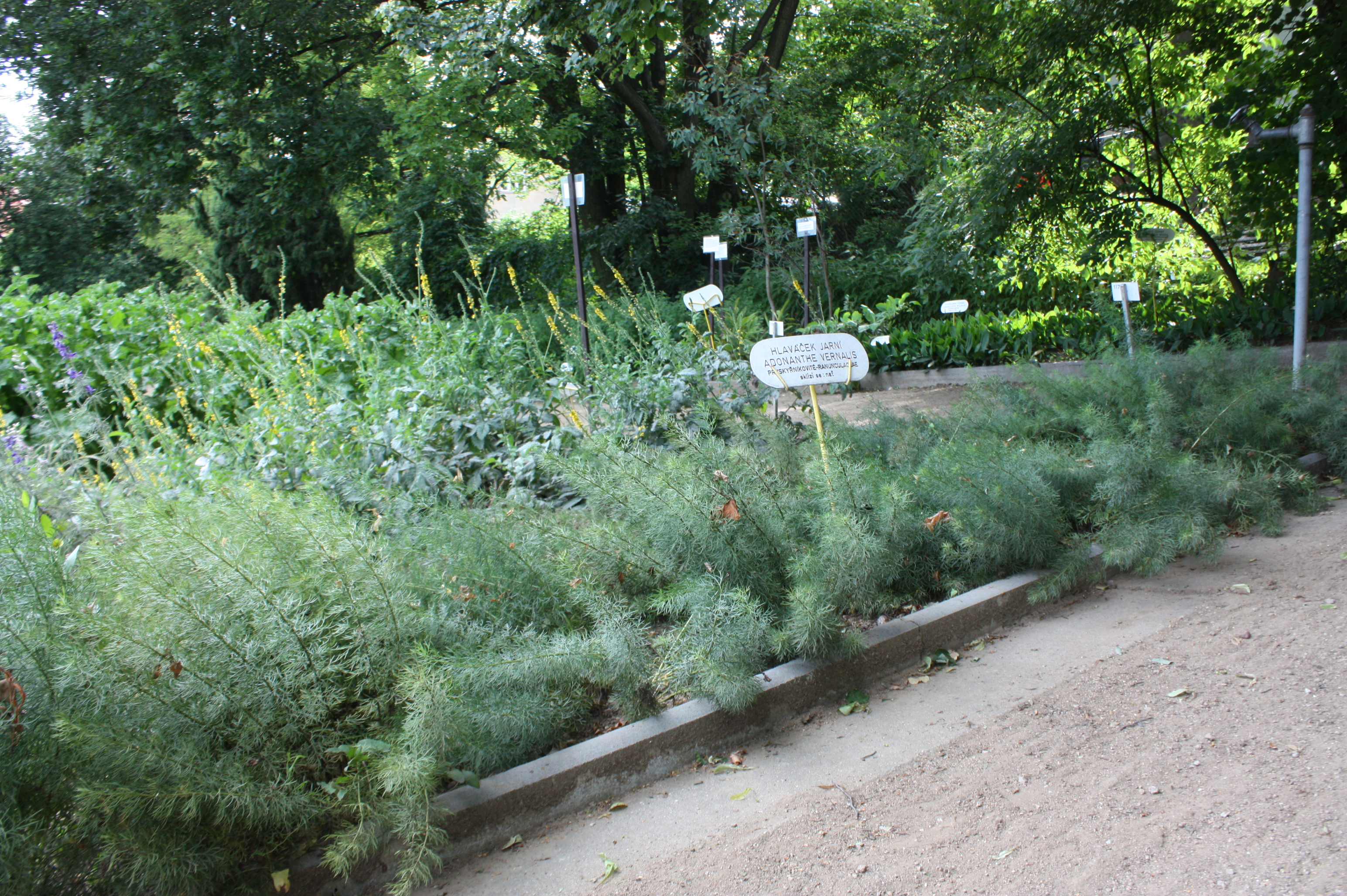 Botanická zahrada Brno Kravi hora